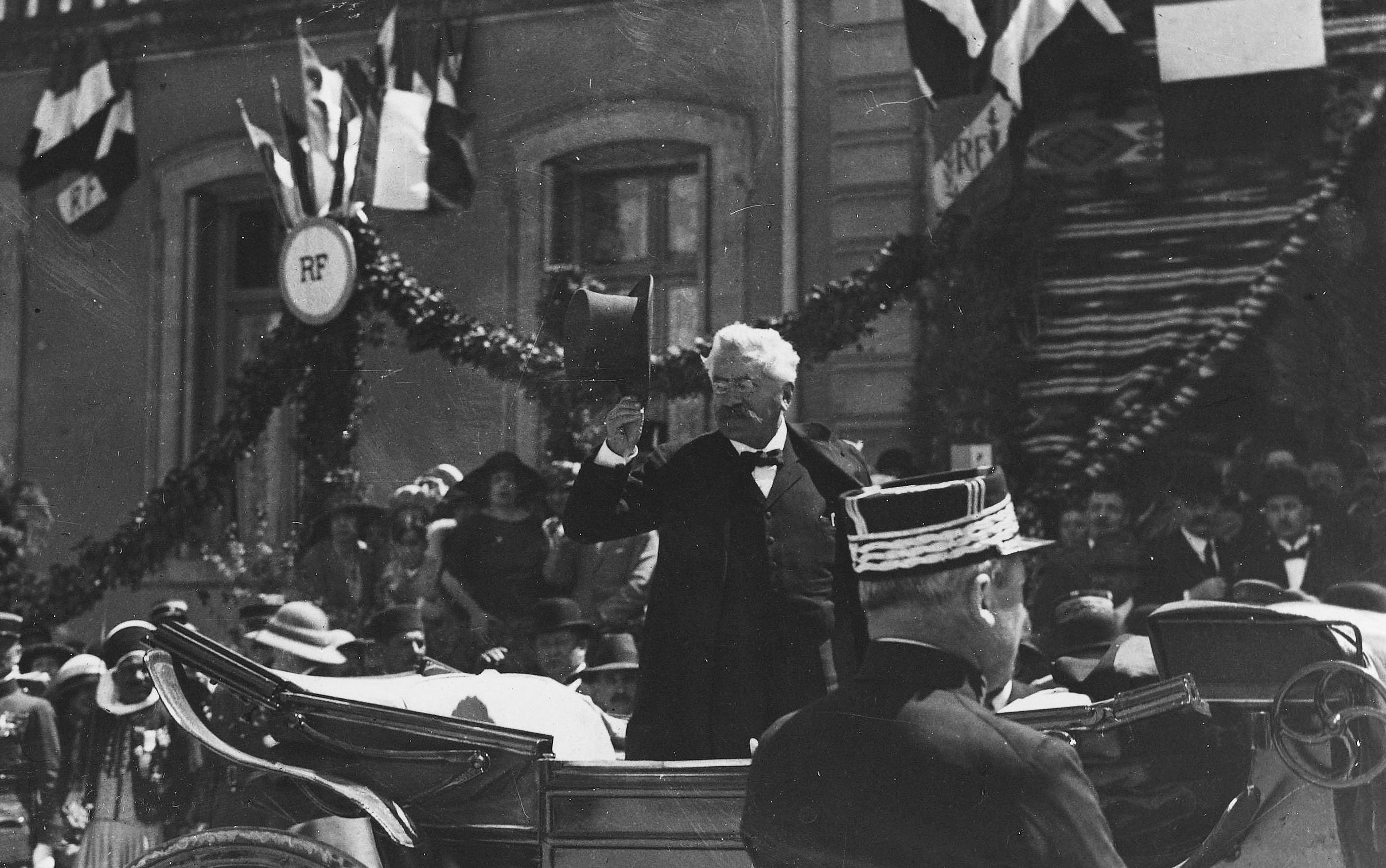 Le président de la République française, Alexandre Millerand, à Sidi Bel Abbès.